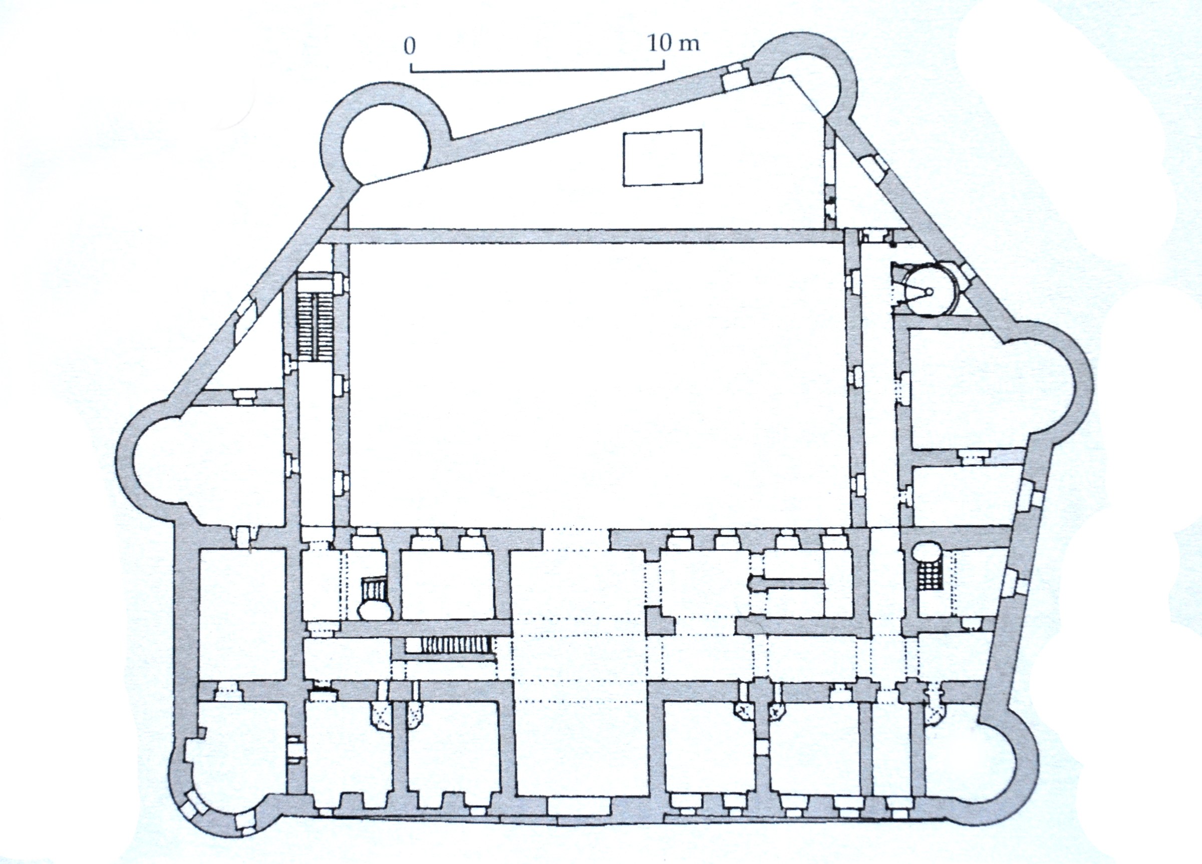 Nerealizovaný projekt přestavby přísečnického zámku od J. H. Deinebiera z roku 1726